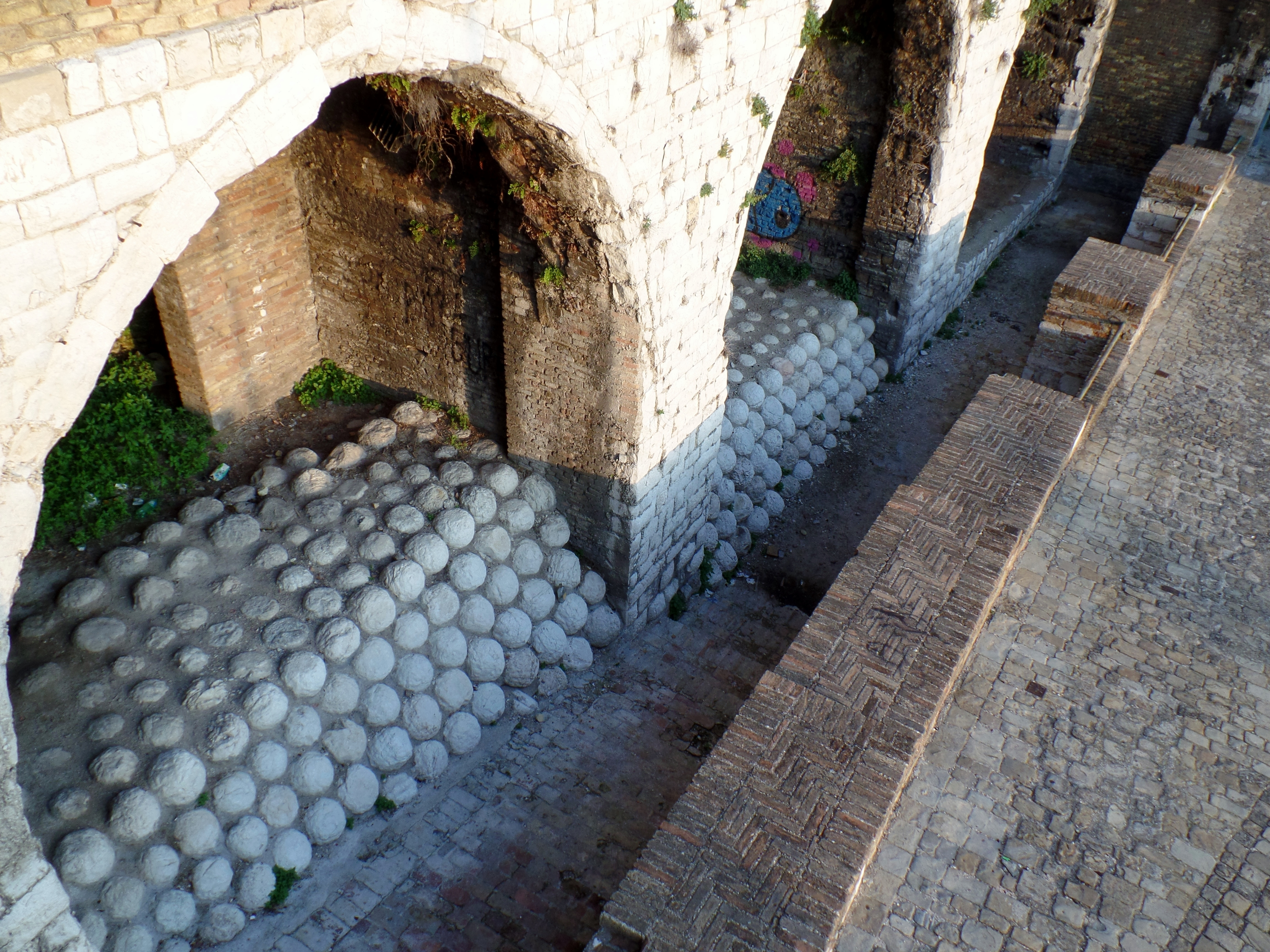 Palazzo degli Anziani Ancona Via Rupi Comunali palle di pietra